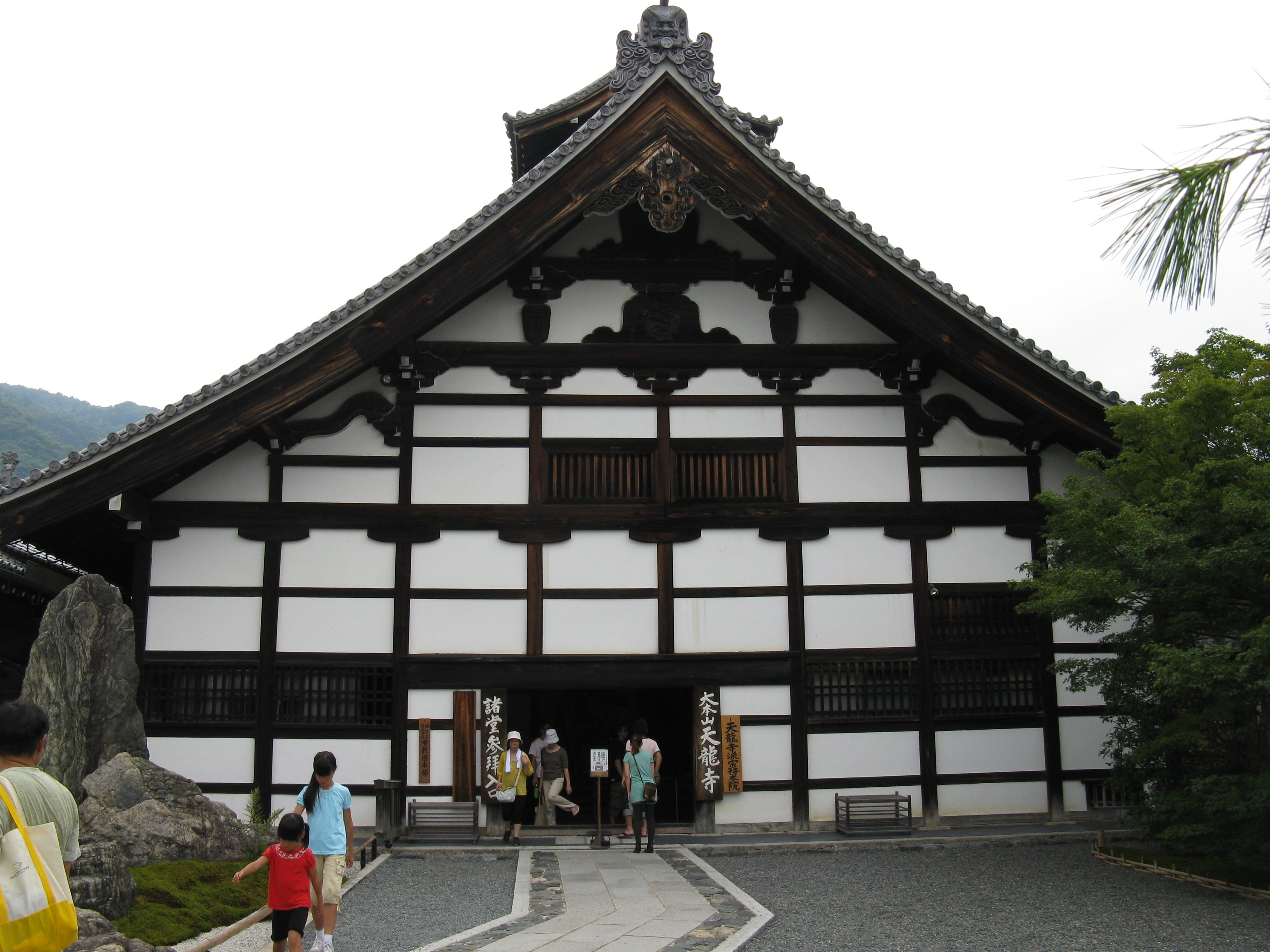 天龍寺 庫裏